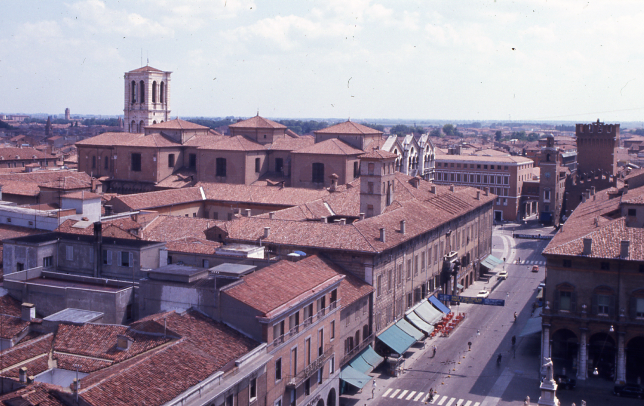 Servizio fotografico : Ferrara, 1974 / Paolo Monti. - Foglio: 1, Fotogrammi complessivi: 3/20 : Diapositiva, sviluppo cromogeno/ pellicola ; 35 mm. - ((Sullo chassis della diapositiva n. 01 iscrizione manoscritta: "Fe". - Confronti con negativi (b/n - gelatina bromuro d'argento/ pellicola -35mm). - Le diapositive nn. 01-11 e 15-20 costituiscono altre serie. - Occasione: Campagna di rilevamento del centro storico. - Fonte: Rubrica di Paolo Monti: Diapositive 24x36mm (1948-1982), presso Archivio Paolo Monti. Rubrica con elenco soggetti e numeri di inventario (da 1 a 1000) corrispondenti ai fogli a tasche in pvc in cui sono contenute le diapositive. - Fonte: Fattura di Paolo Monti: IV. Commesse/ Fattura n. 18/ Riprese fotografiche del centro storico (Mostra Vitalità del centro storico) (1974/10/16), presso Archivio Paolo Monti